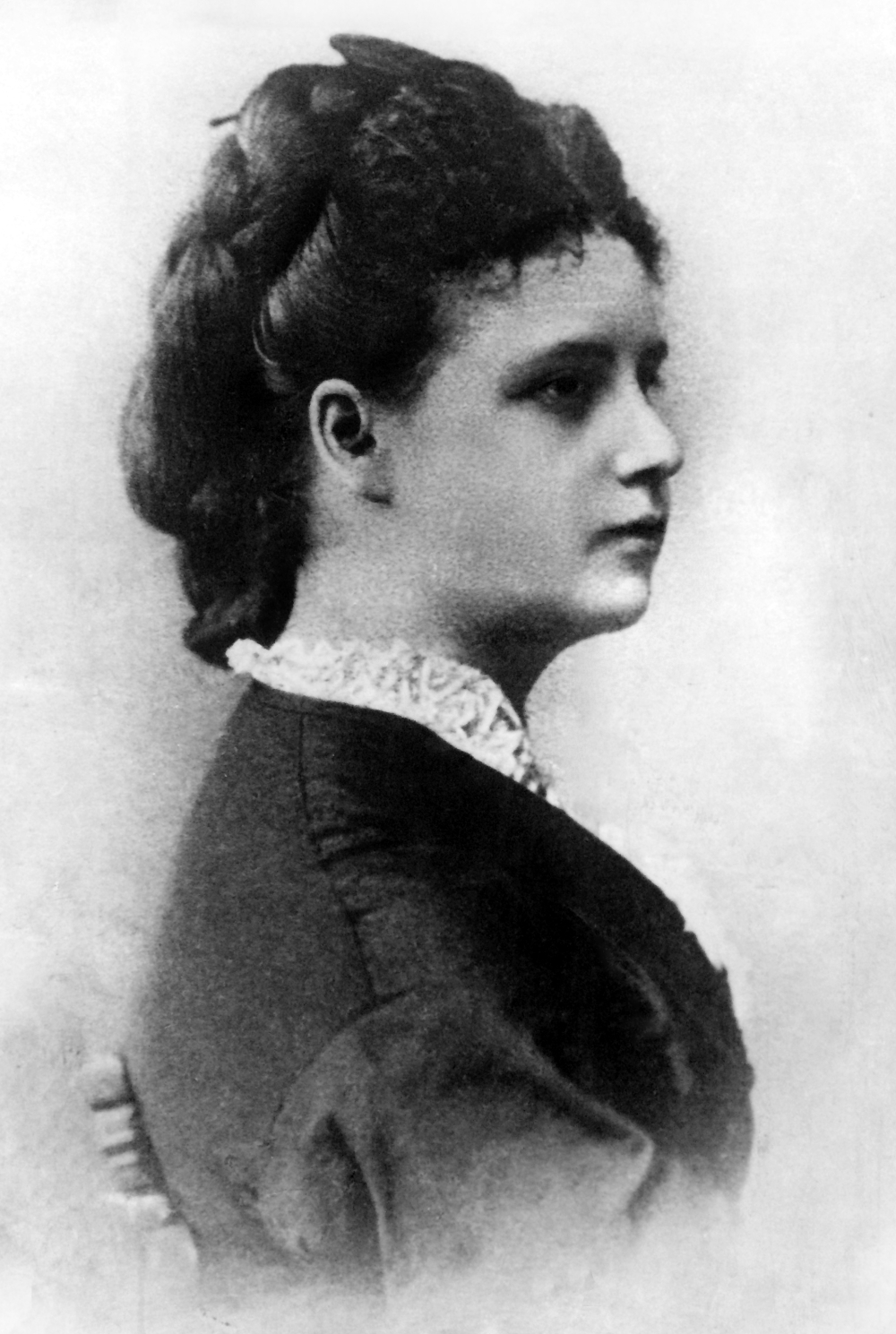 Докучаева, Анна Егоровна урожд. Синклер, (10 ноября 1846 - 2 февраля 1897)